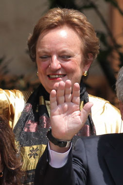 El Presidente de Chile Sebastián Piñera, junto al Ministro de Educación Joaquín Lavín, hizo entrega de los Premios Nacionales 2010.